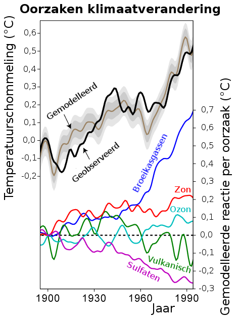 Nederlandstalige versie van File:Climate Change Attribution.png